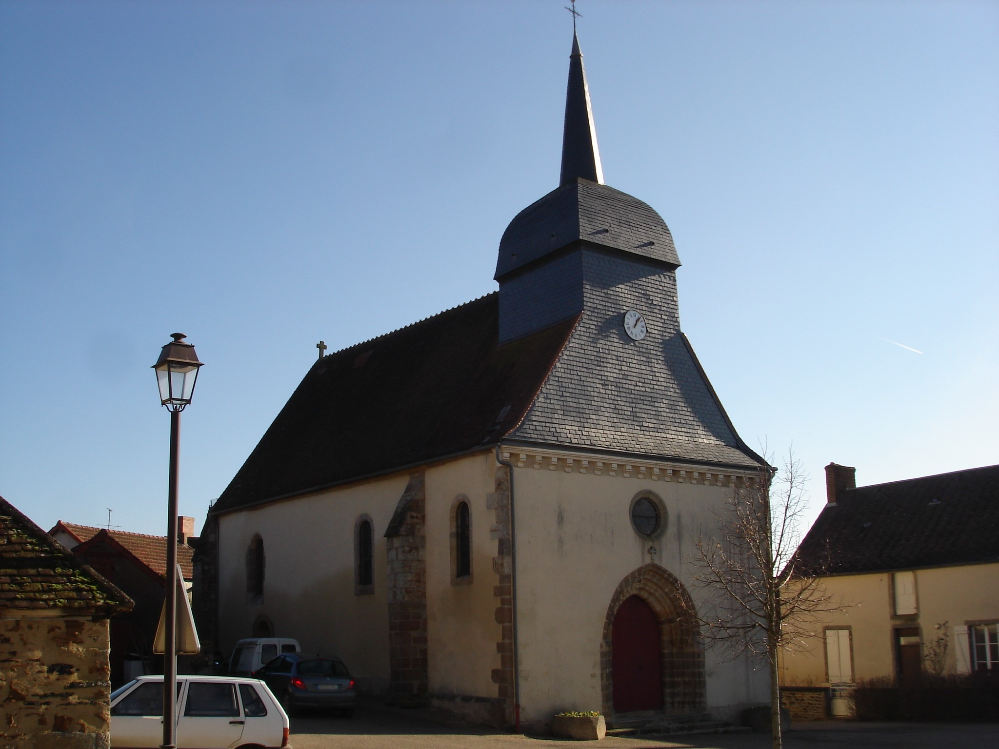 Vijon (36) : L'église.